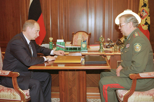 МОСКВА, КРЕМЛЬ. С директором Федеральной пограничной службы Константином Тоцким.